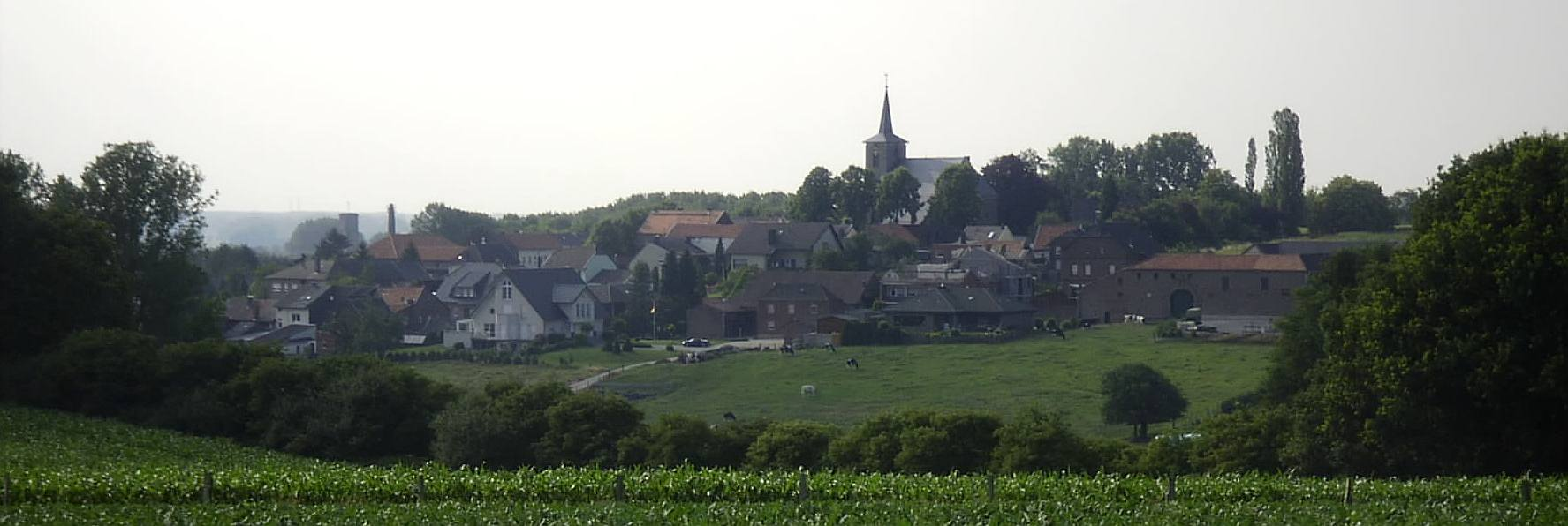 Summary Bildbeschreibung: Linnich-Glimbach Quelle: eigenes Foto Fotograf/Zeichner: bodoklecksel 16:31, 26. Jun 2006 (CEST). Datum: Juni 2006 Sonstiges